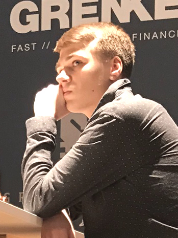 Rasmus Svane, Runde 9 der Grenke Chess Open 2019 in Karlsruhe.